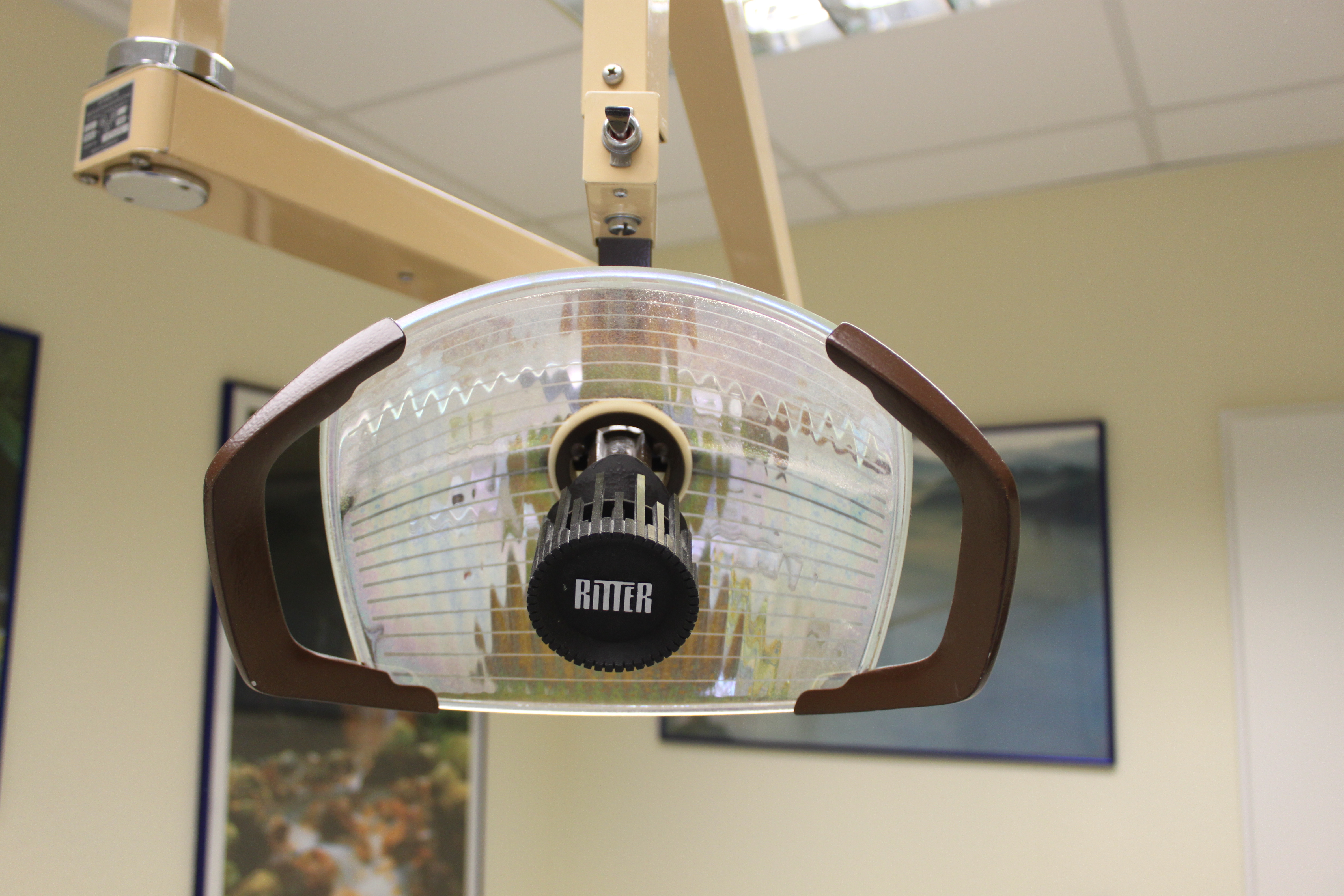 Zahnarztstuhl Ritter